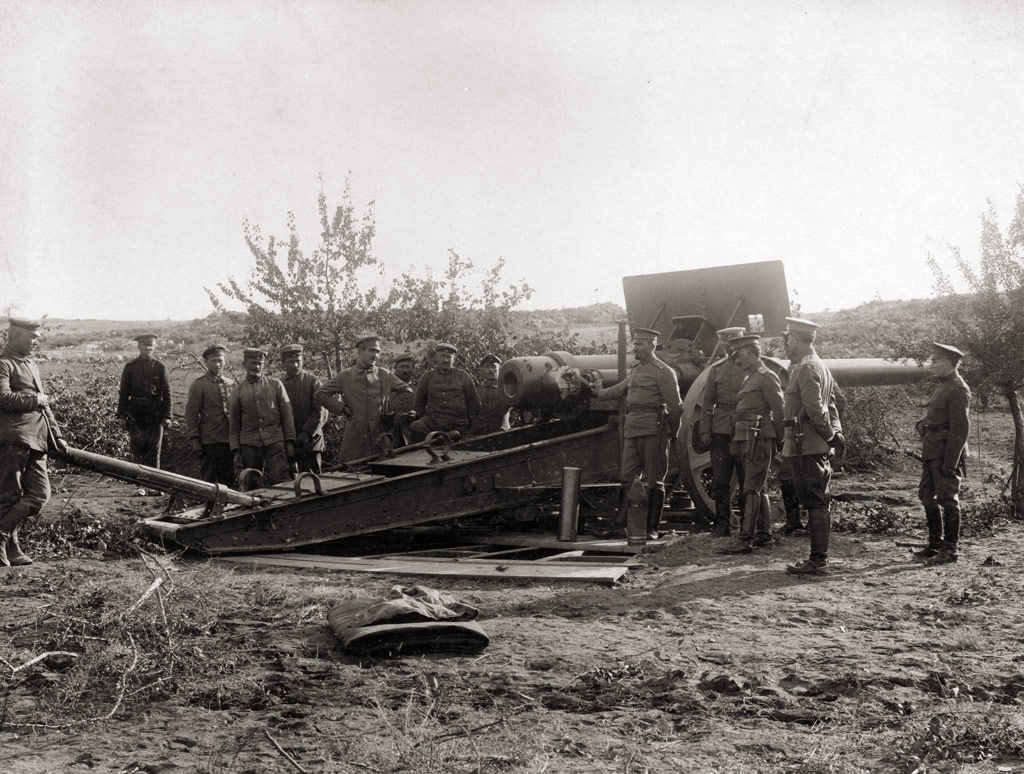 Bulgarische und deutsche Soldaten mit einer schweren deutschen Feldkanone des Ersten Weltkrieges. D-40 (= 15cm SKL/40 IRL) an der Südfront